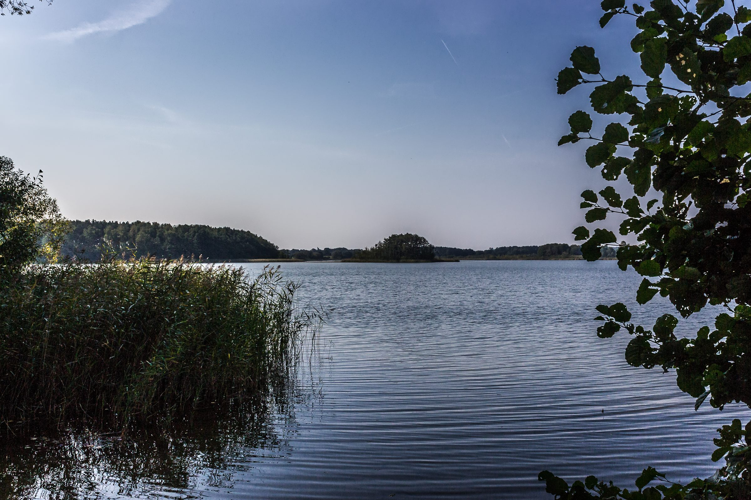 Serwester See